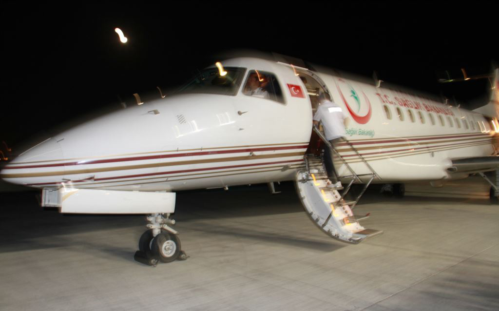 İsrail'in Gazze'ye yönelik hava bombardımanı sonucunda yaralanan üçü kadın biri erkek dört Filistinliyi Tel Aviv'den Ankara'ya taşıyan T.C. Sağlık Bakanlığına ait ambulans uçak.